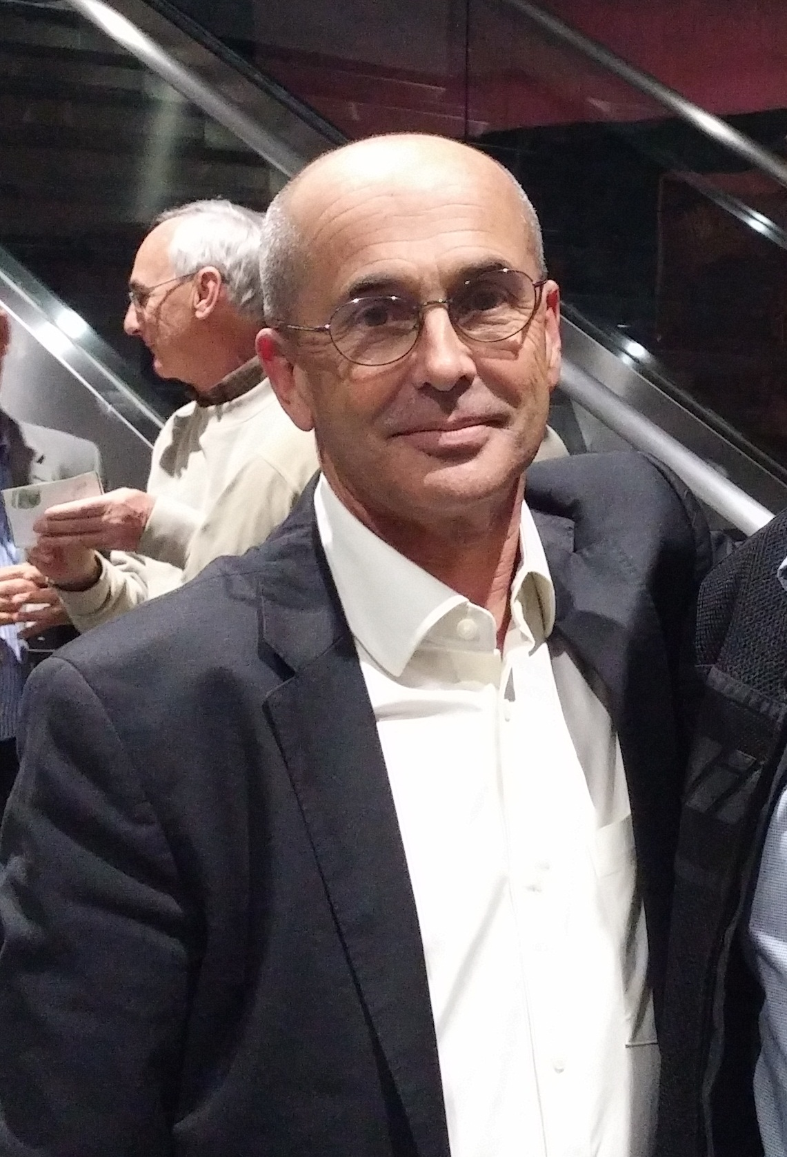 El escritor Don Winslow durante una presentación de su novela El Cártel en Madrid en Octubre de 2015